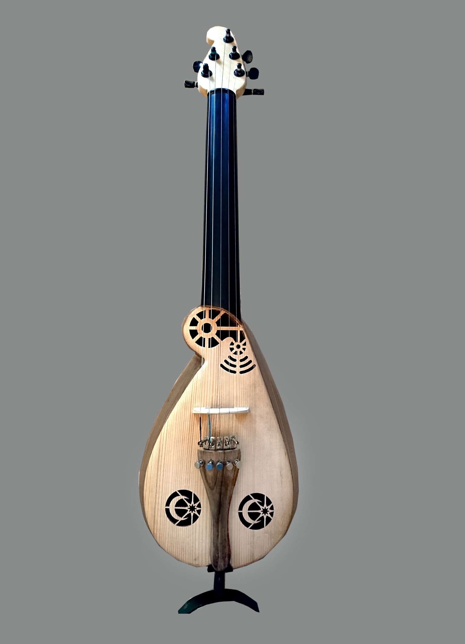 Azərbaycanın Milli yaylı-simli musiqi aləti